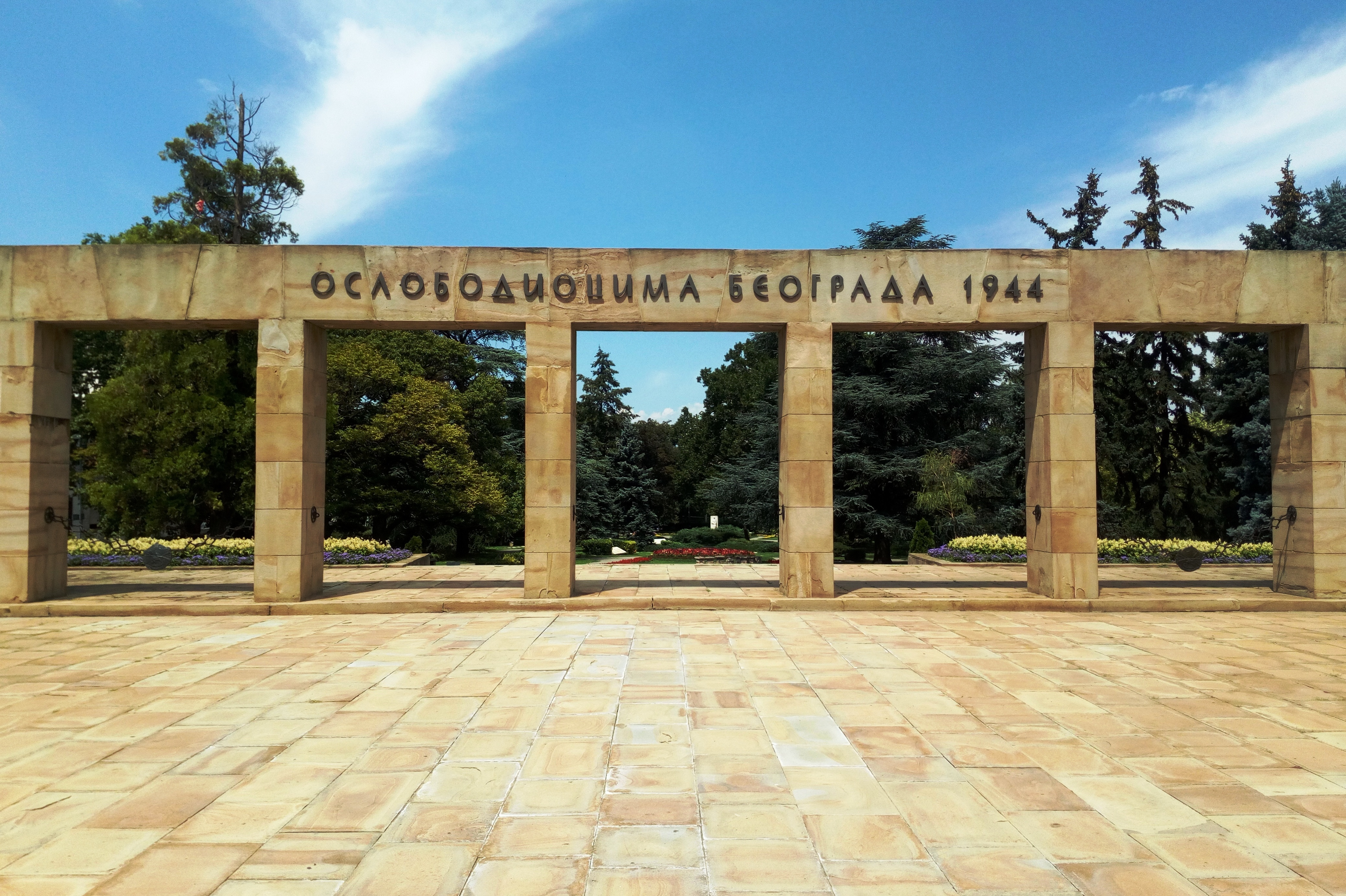 Улаз у Гробље ослободилаца Београда 1944.